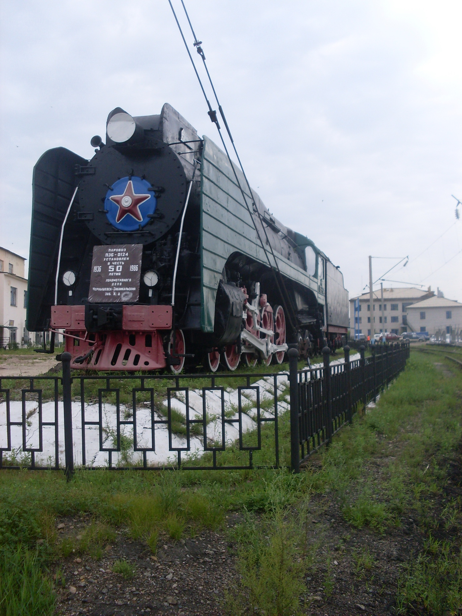 Памятник П36-0124 в Чернышевске